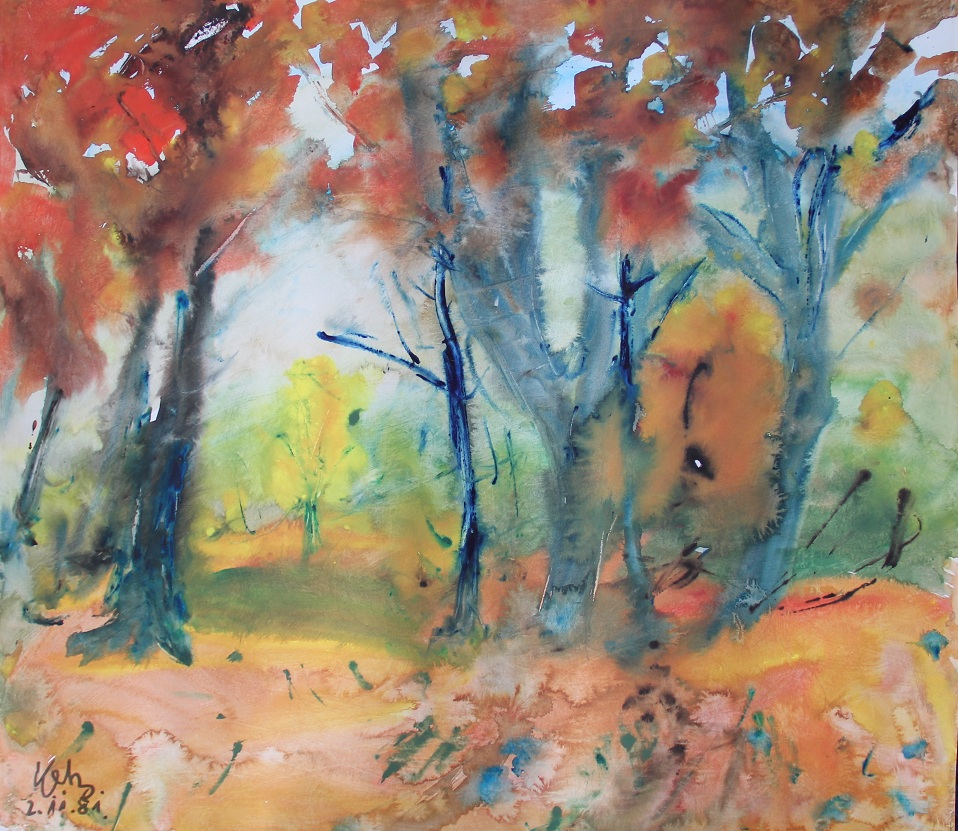 Aquarell 70 x 80 cm